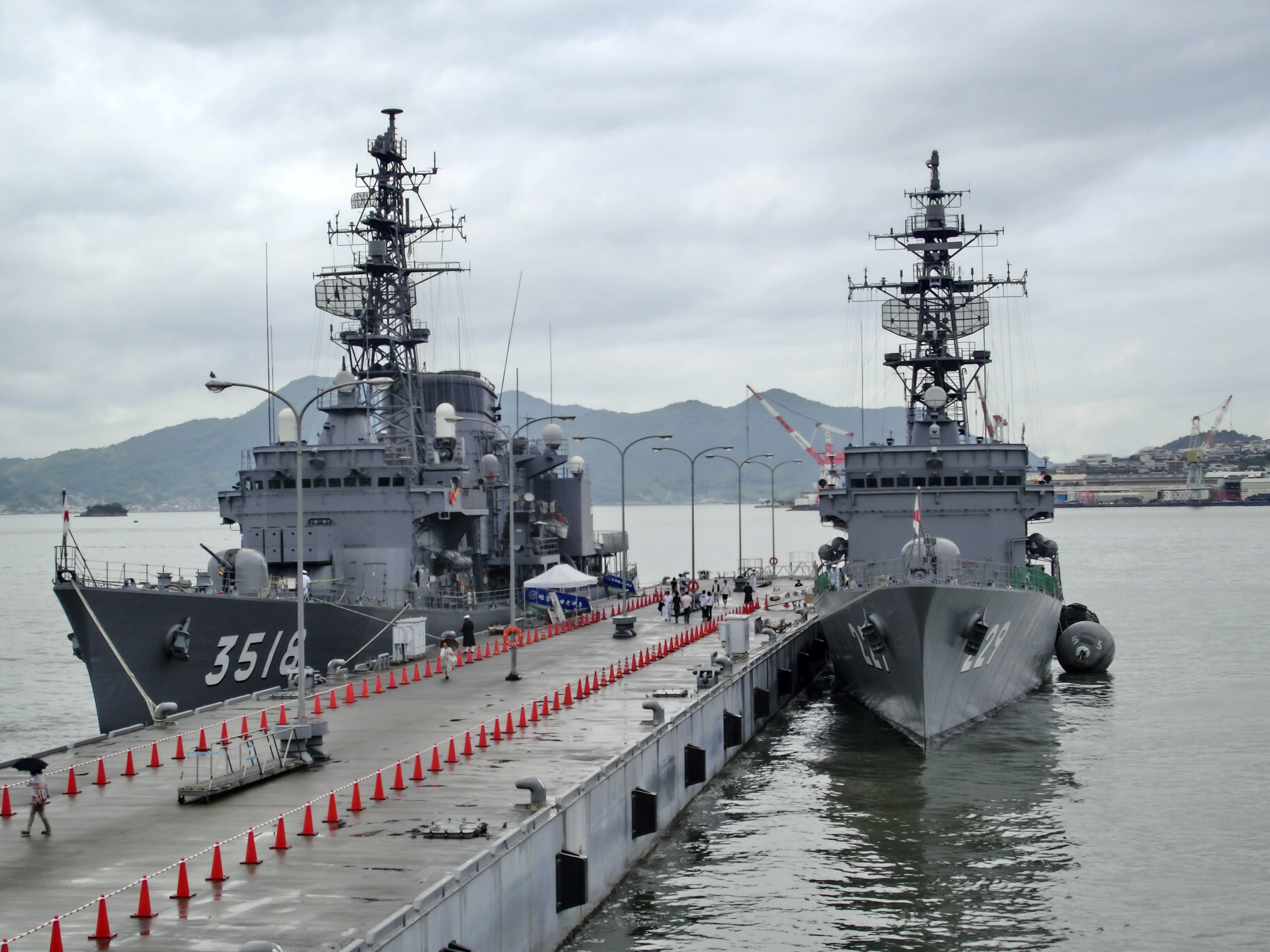 呉・Eバースに停泊中の 〔左〕 練習艦せとゆきと 〔右〕 護衛艦あぶくま。ぶんごの艦尾より撮影。前日に続いて雨天中止となった平成25年度呉地方隊展示訓練にて。